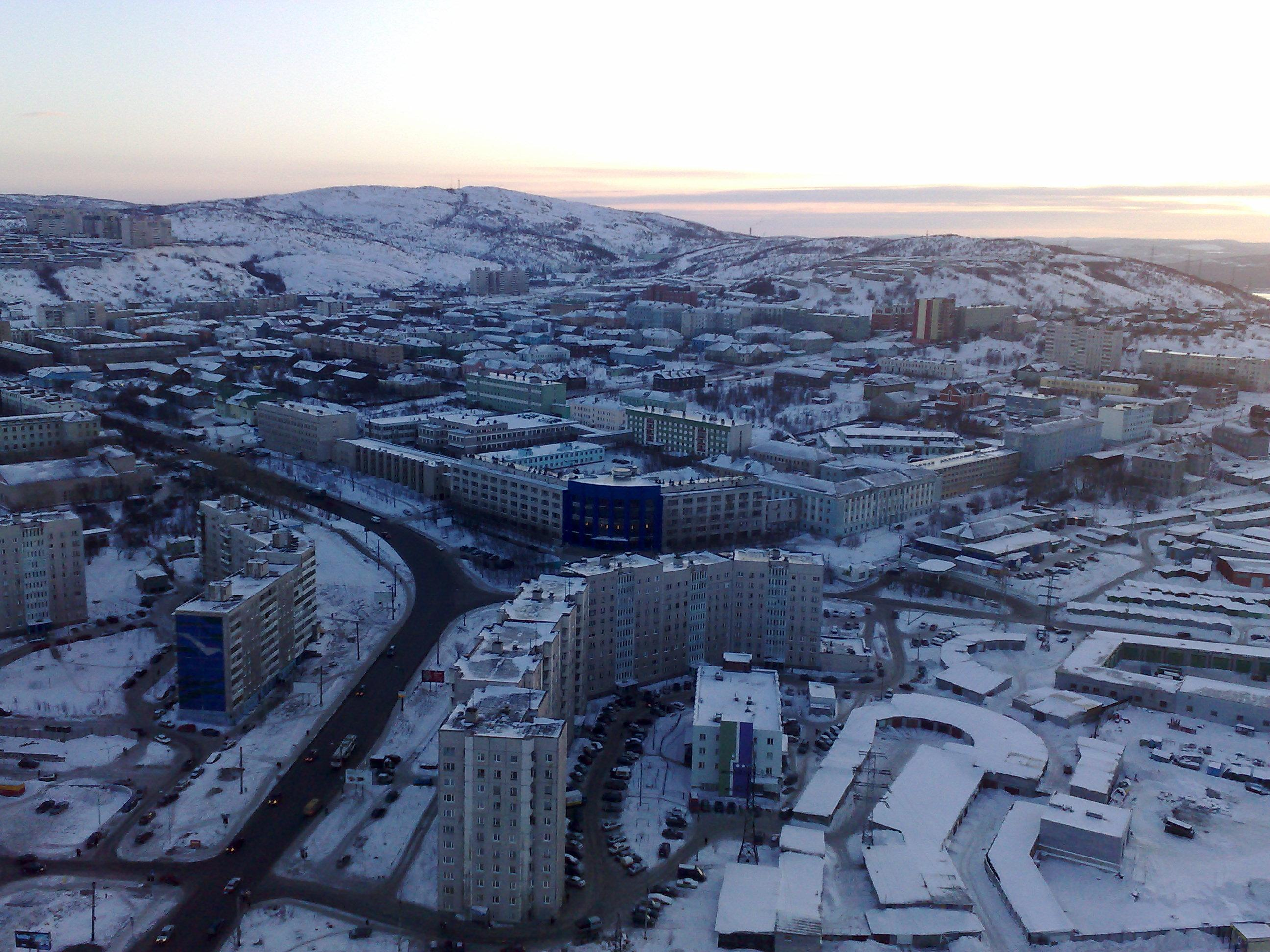 Высшая мореходка